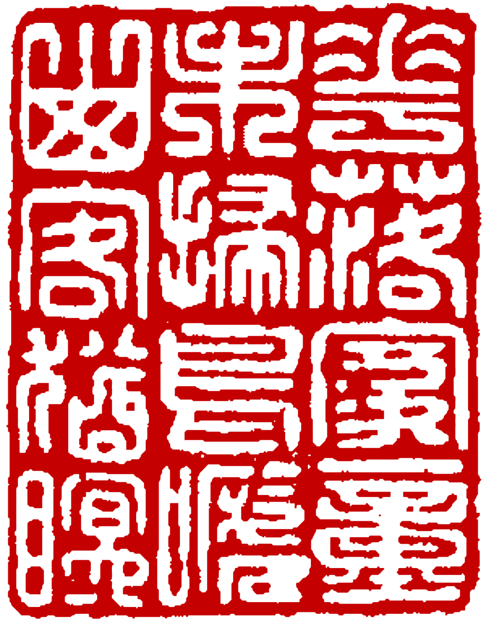 中文（香港）: 東皋心越刻花落家童未扫鸟啼山客犹眠印